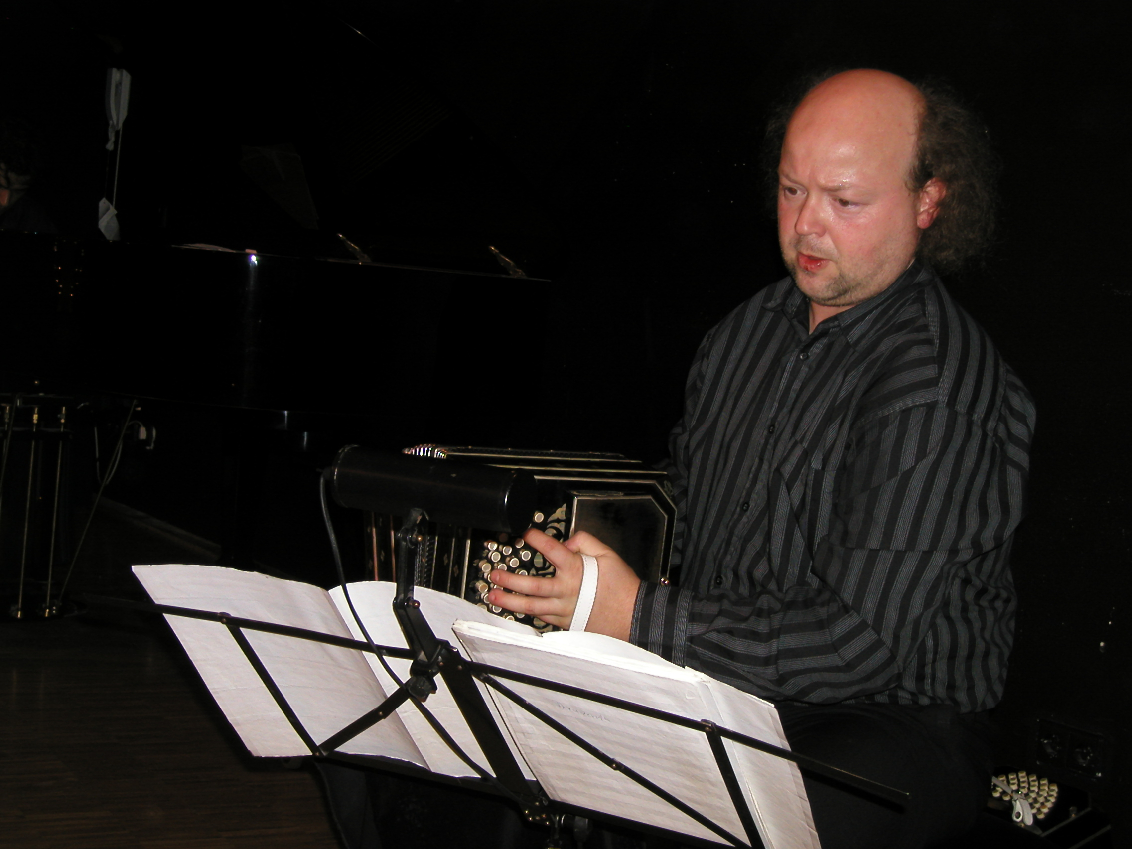 Bandoneonist Jürgen Karthe von Tango Amoratado